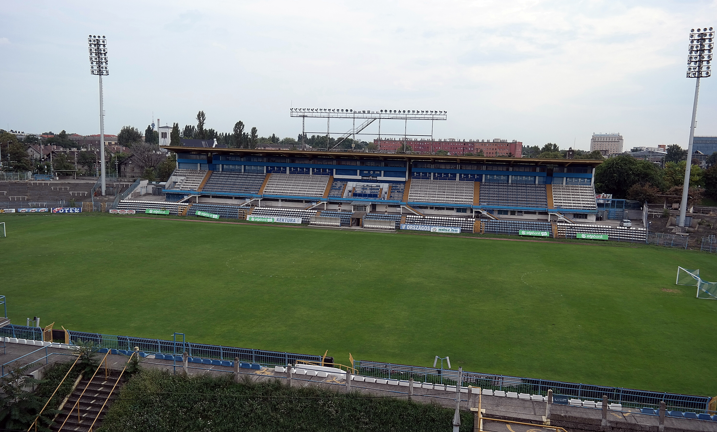 Az MTK stadionja a 2015-ös bontás előtt (Budapest, Salgótarjáni út)